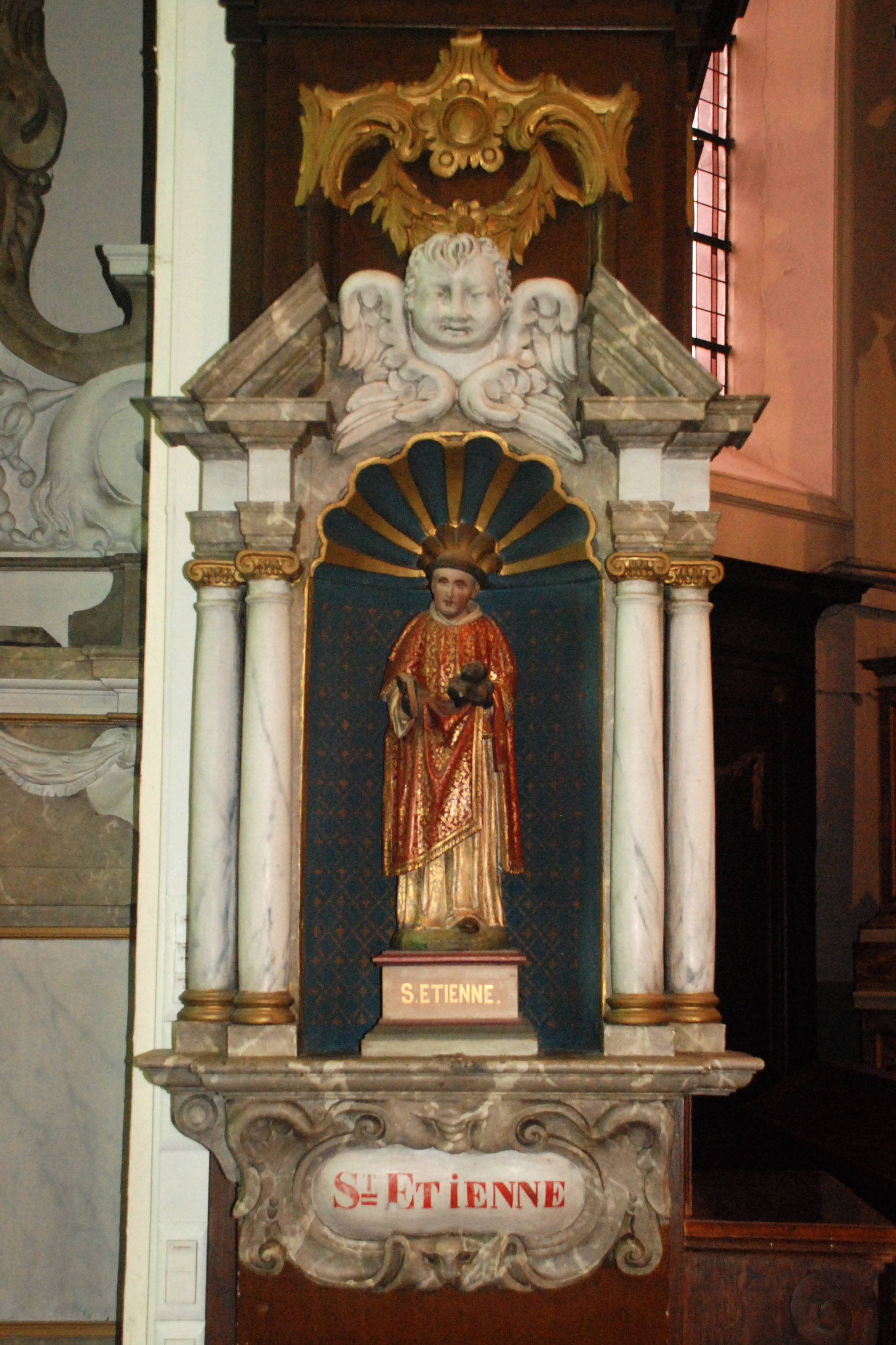 Belgique - Brabant wallon - Église de Court-Saint-Étienne